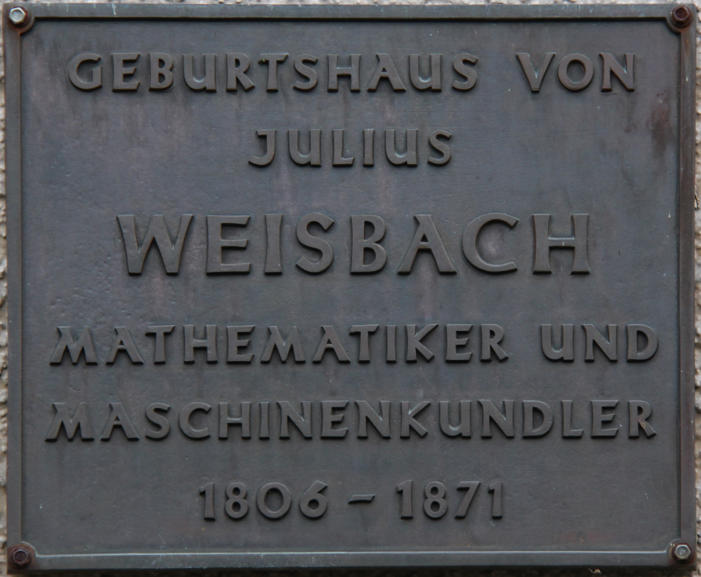 Plakette an der Hammerschänke in Mittelschmiedeberg, Geburtshaus von Julius Ludwig Weisbach